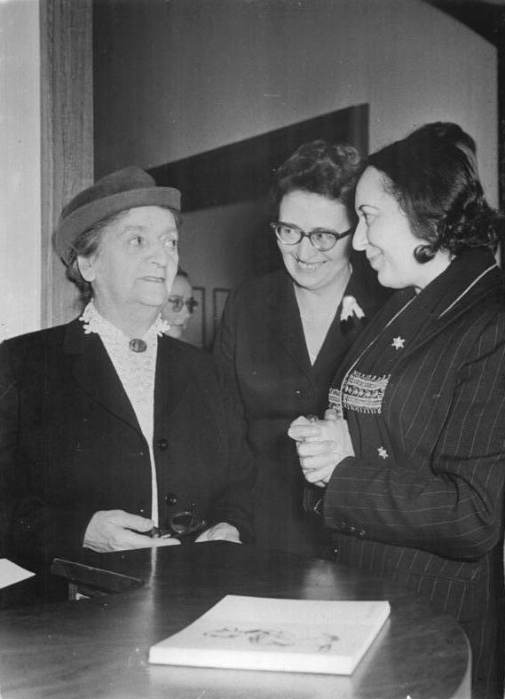 Zentralbild Ulmer 17.1.1959 25. Kunstausstellung der Deutschen Bücherstube Am 17.1.59 wurde in den Bäumen der Deutschen Bücherstube in Berlin, Friedrichstraße, die 25. Kunstausstellung unter dem Titel " Der unbekannte Hans Grundig " eröffnet. Die Ausstellung wird bis zum 14. Febriar d. Jahres geöffnet sein und Gemälde, Aquarelle und Zeichnungen des verstorbenen Künstlers zeigen. UBz: (V.l.n.r.) Frau Dr. Gusti Wieghardt-Lazar, Frau Ilse von Kampt und Lea Grundig, die Gattin des verstorbenen Künstler in der Ausstellung.